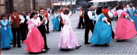 Volkspele